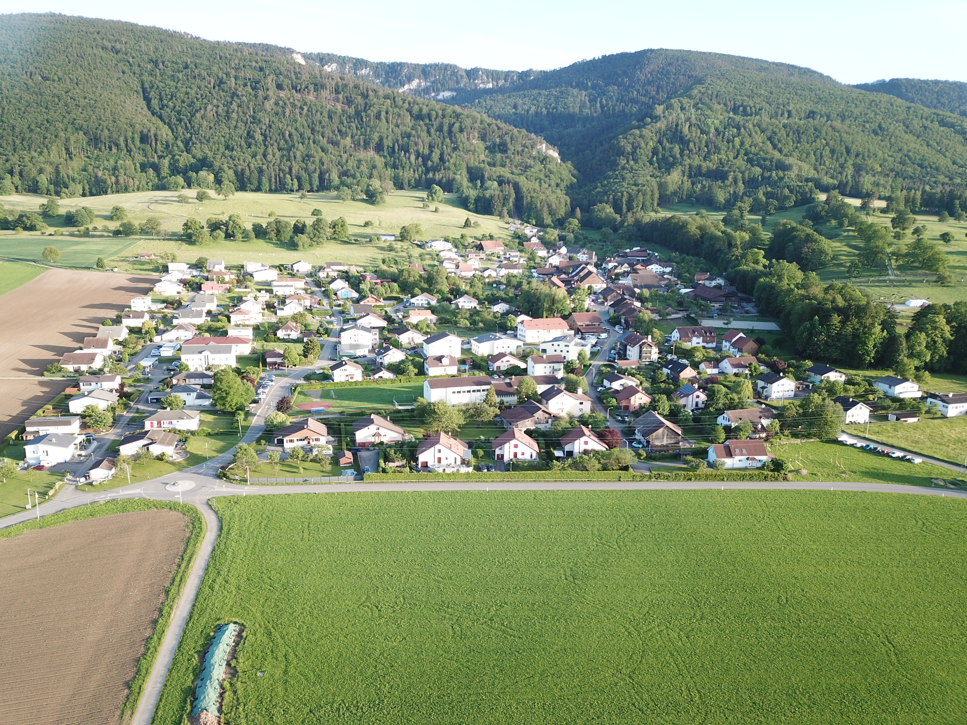 Châtillon vu depuis le Susten